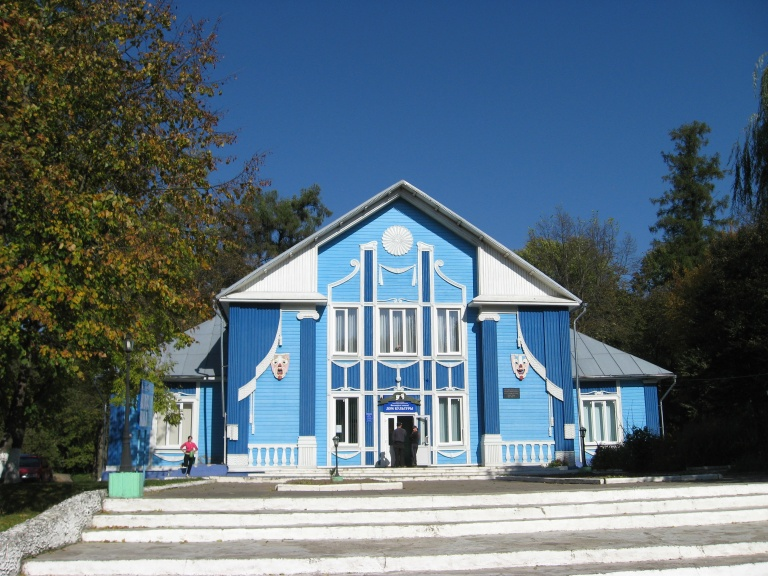 Вольна. Дом культуры